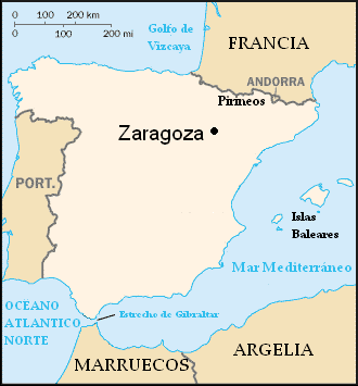 El mapa original es el de la página inglesa sobre Zaragoza